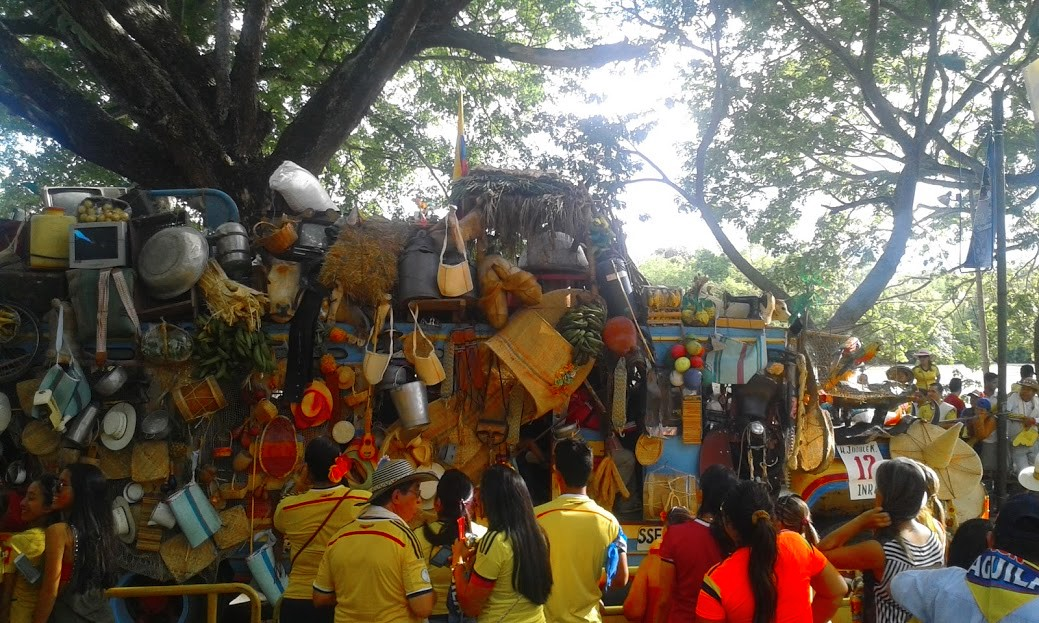 Fiestas de San Pedro, Neiva, Huila. Esta fotografía fue tomada en el municipio colombiano con código 41001.